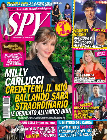 Copertina di Spy 2 marzo 2018